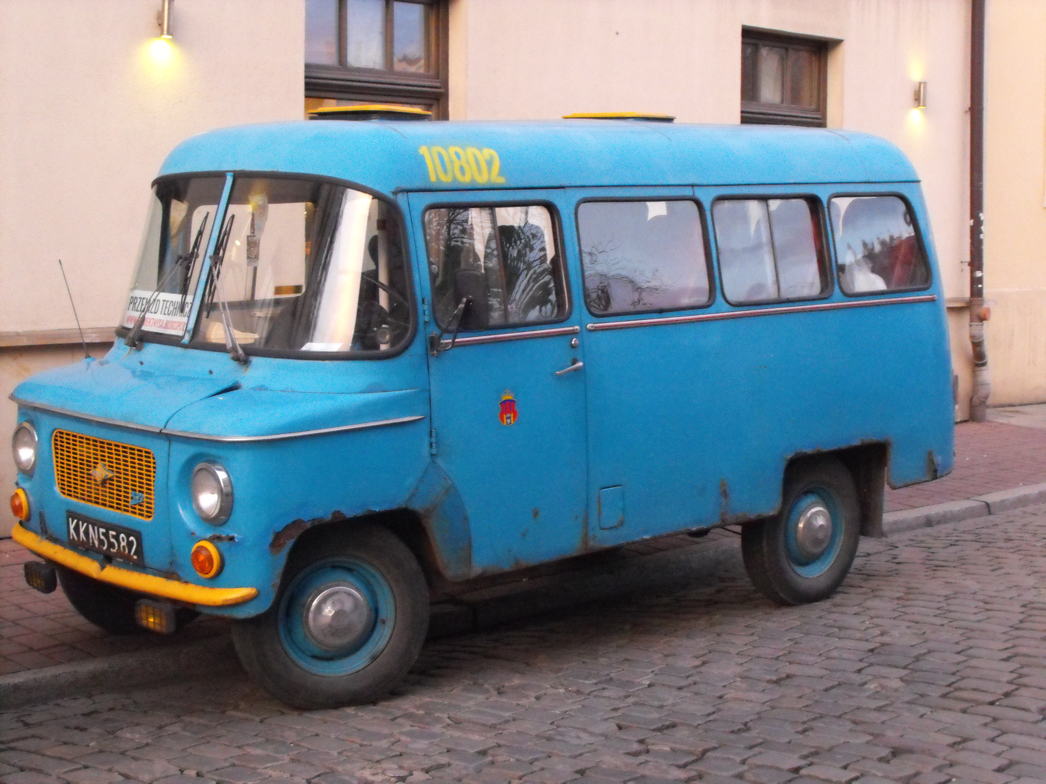 Nysa 522M ul. Na przejściu w Krakowie